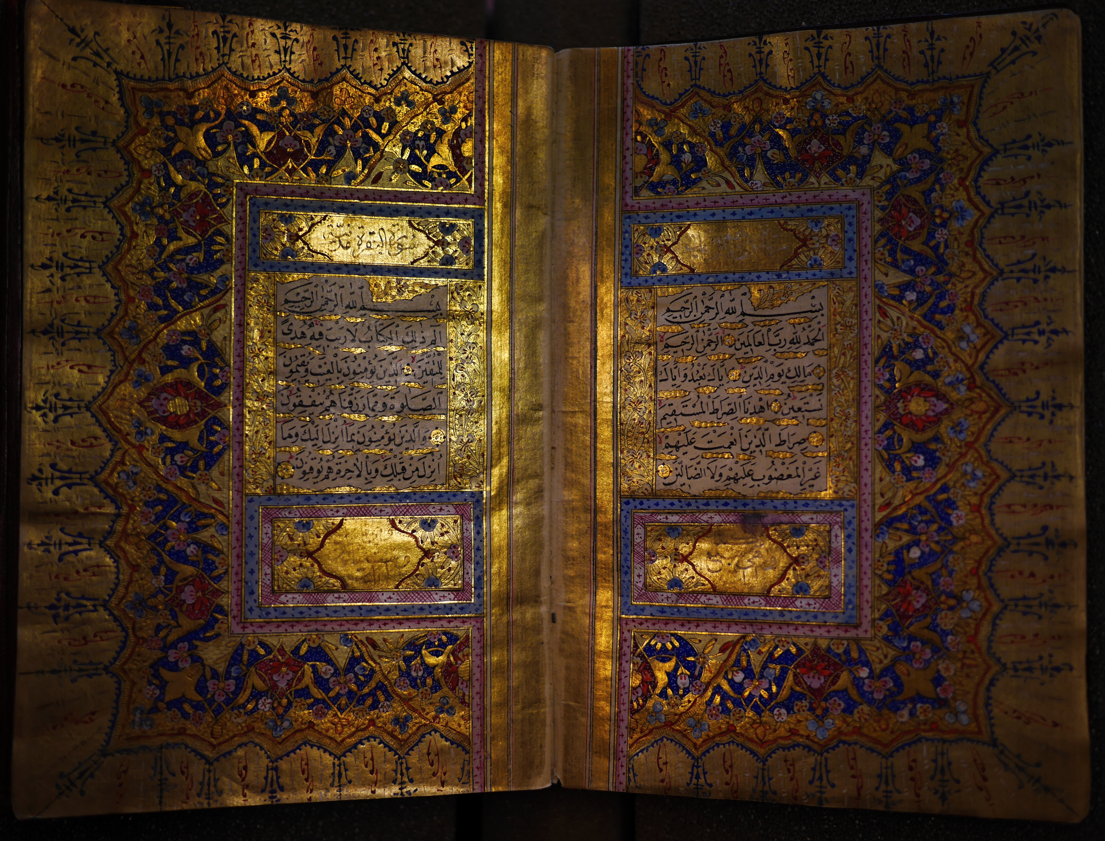 Coran, copié sur papier oriental par Muhammad Nûr al-Dîn al-Shamnawî, 1823 (manuscrit 5002, Université de Liège) This is a file created at the museum: Library of Université de Liège